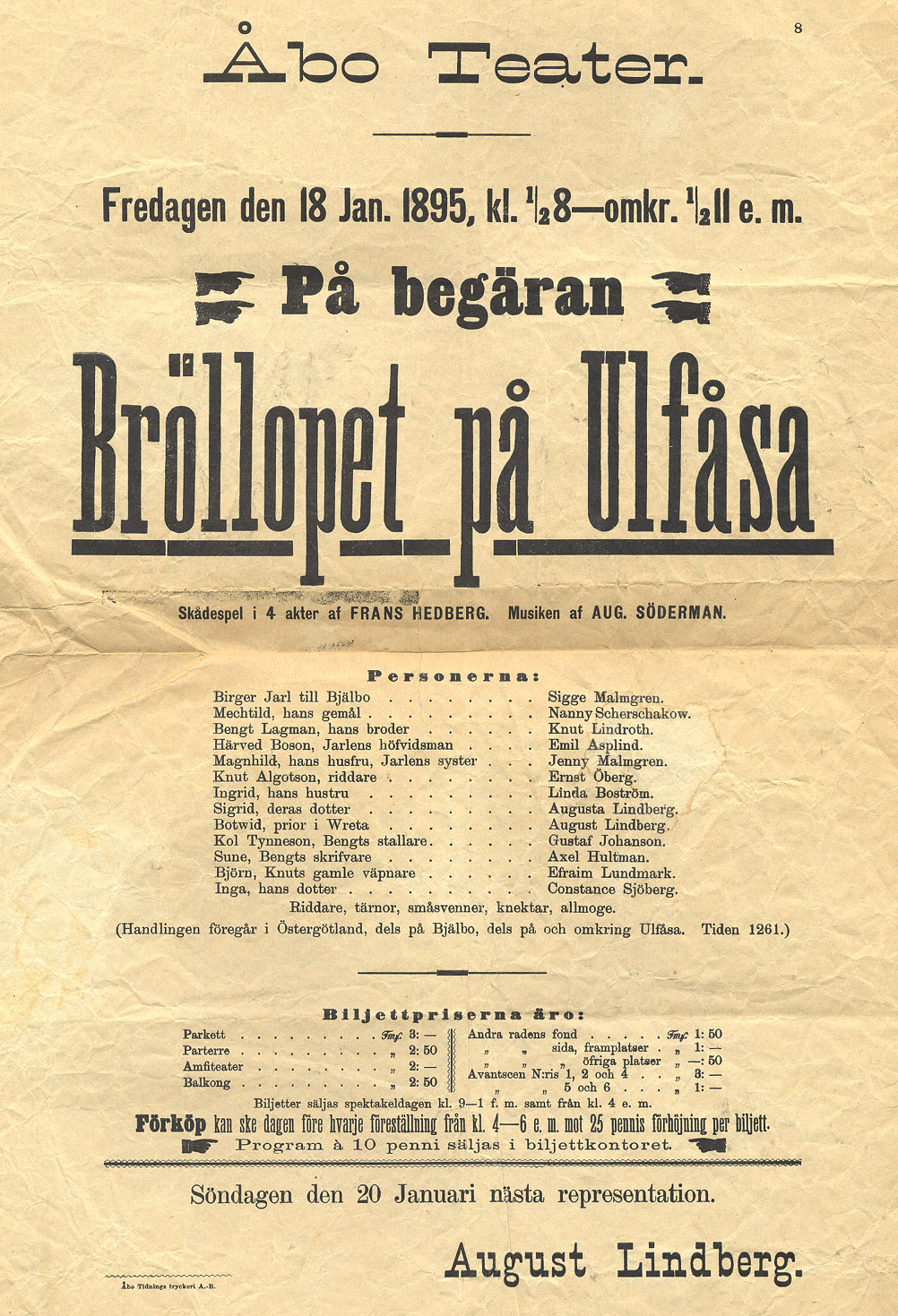 Affisch för teaterföreställningen Bröllopet på Ulfåsa, regisserad av Frans Hedberg, på Åbo Svenska Teater 18.1.1895.